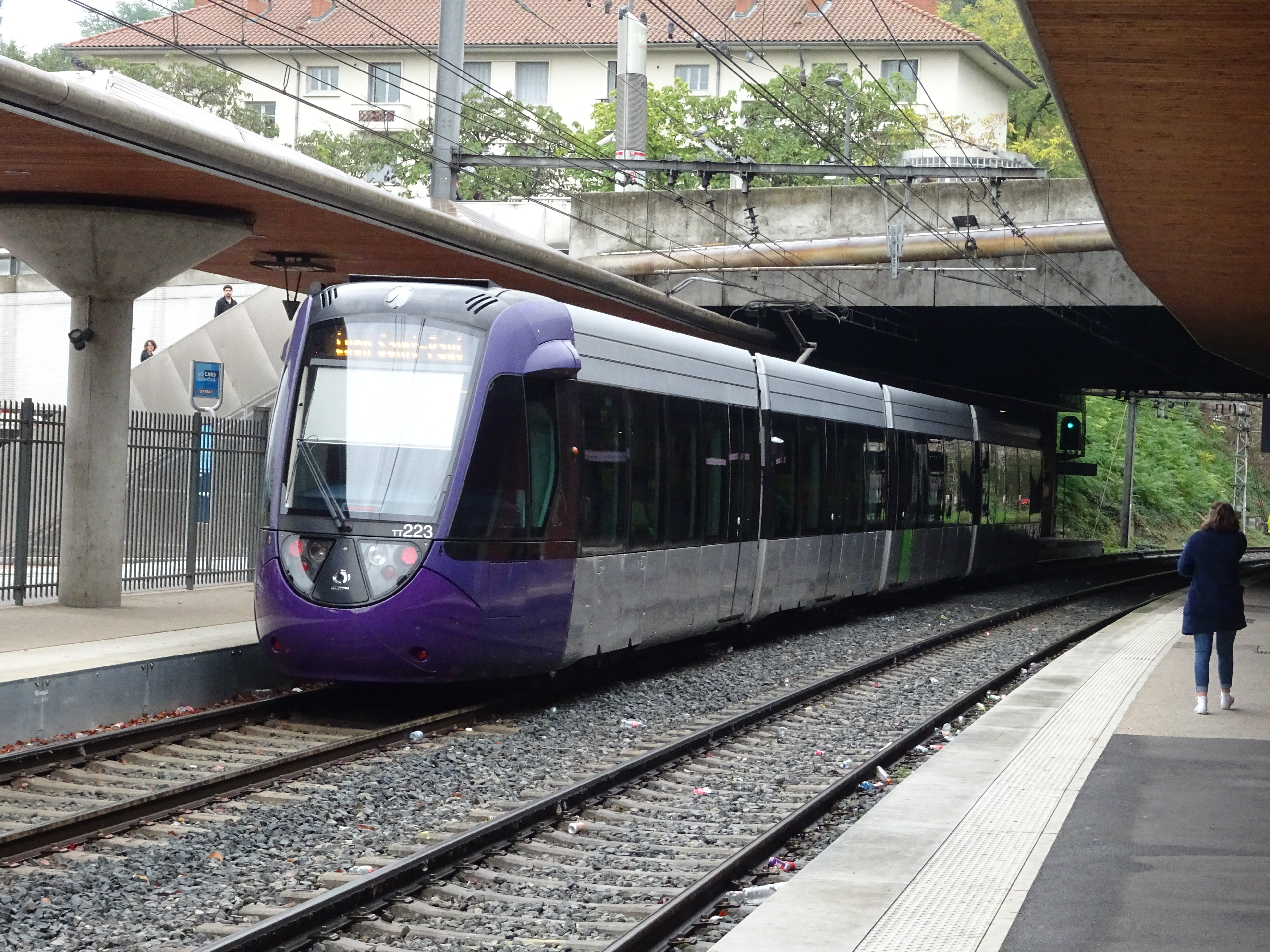 U 52500 à quai à Gorge de Loup. Il desservira ensuite Lyon-Saint-Paul.